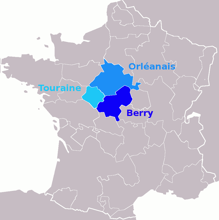 Carte schématique des anciennes provinces de France composant l'actuelle région Centre.